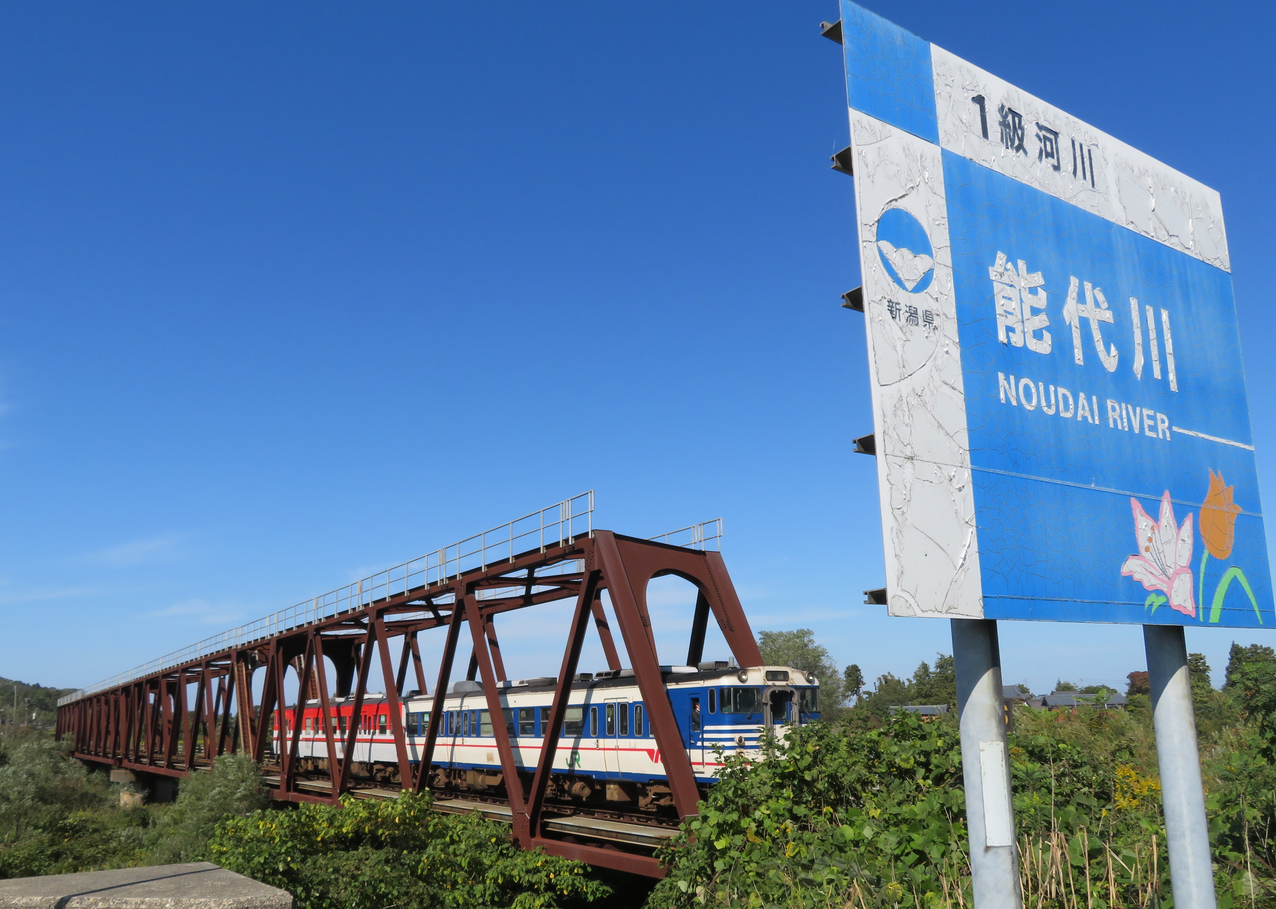 JR磐越西線能代川橋梁（新関駅方面側から撮影） Canon PowerShot SX720 HS